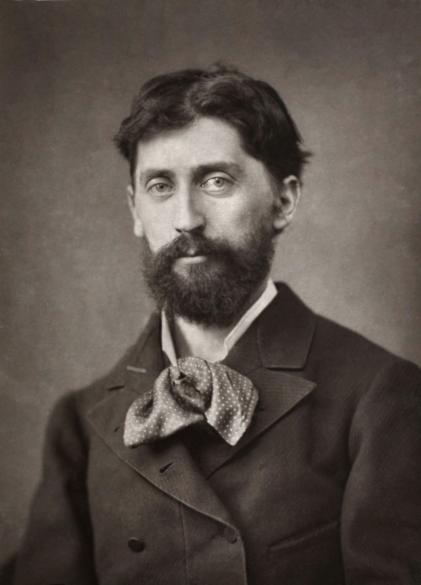 Georges Moreau de Tours (1848 - 1901), peintre français. Reproduction par photoglyptie (Woodburytype), extrait de Album Artistique et Biographique Salon de 1882 - E. Francfort éditeur.